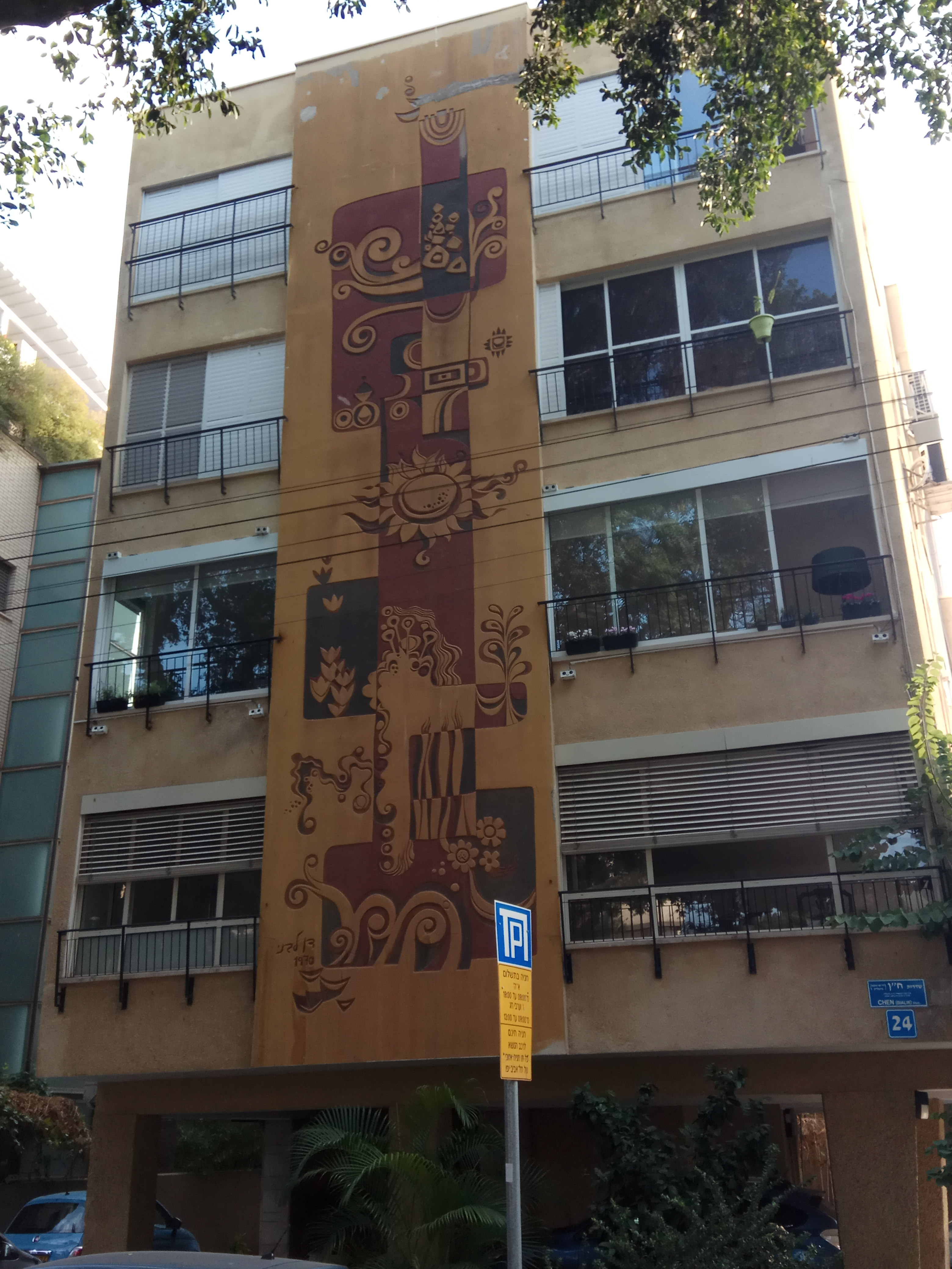 ציור סגרפיטו של דן לבני על בניין בשדות ח"ן 24 בתל אביב